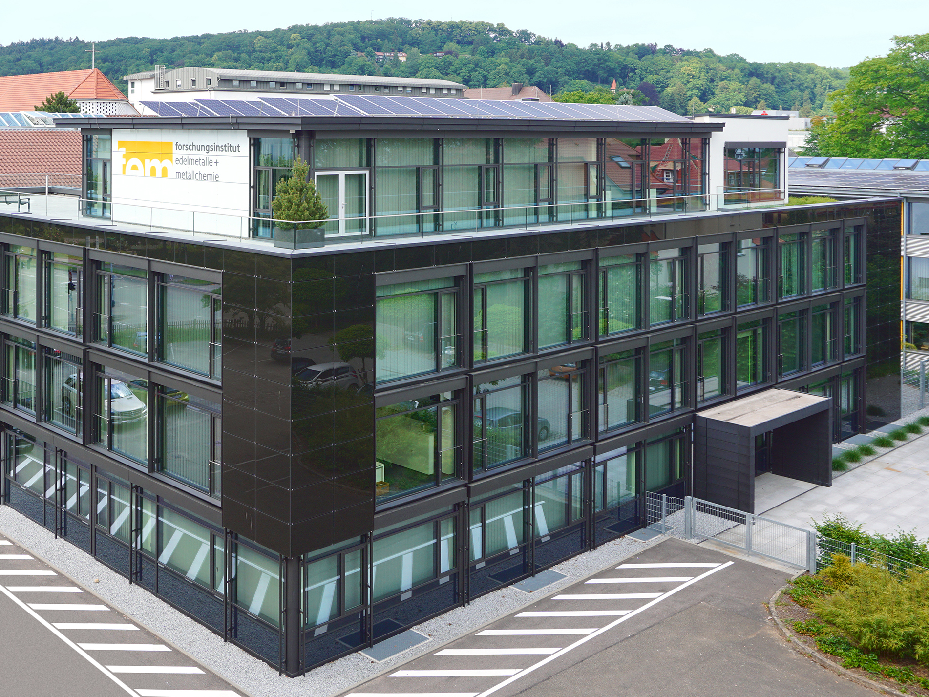 Der 2011 eröffnete Anbau des Forschungsinstituts Edelmetalle + Metallchemie, das sogenannte Applikationstechnikum